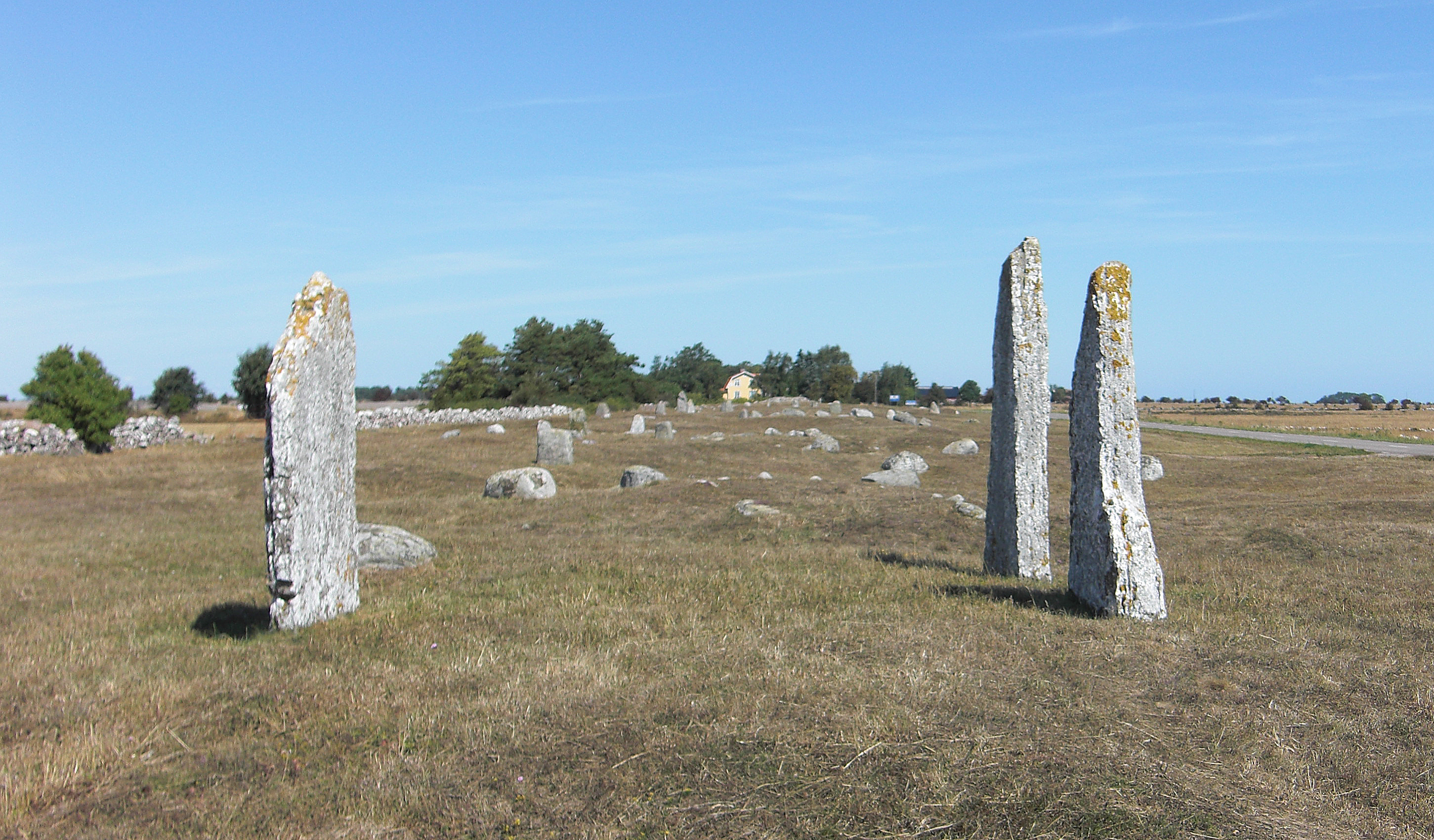 Seby gravfält (Raä-nr Segerstad 24:1) i Segerstads socken, Mörbylånga kommun, Öland, Kalmar län, Sverige.